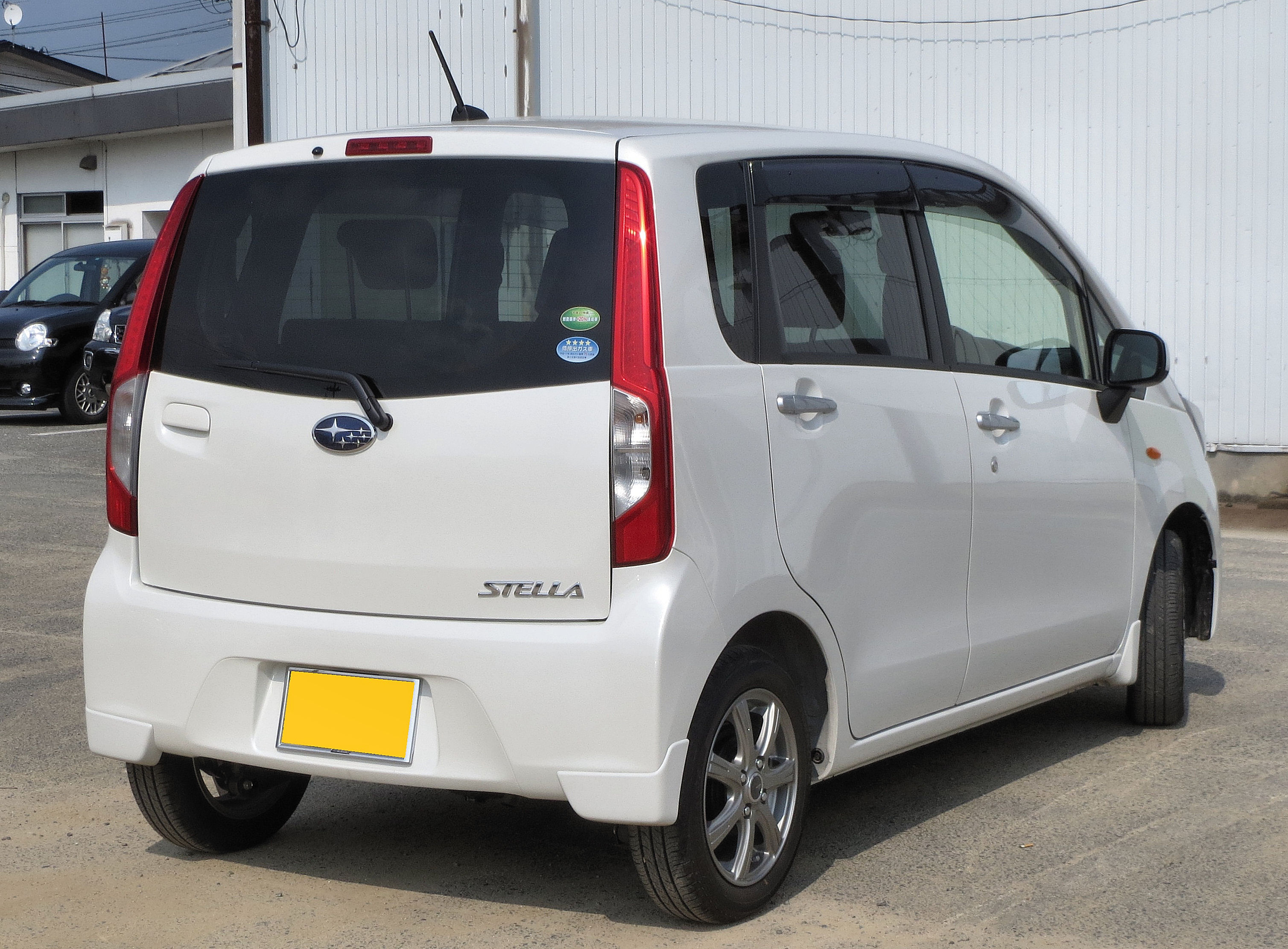 スバル ステラ L スマートアシストAWD